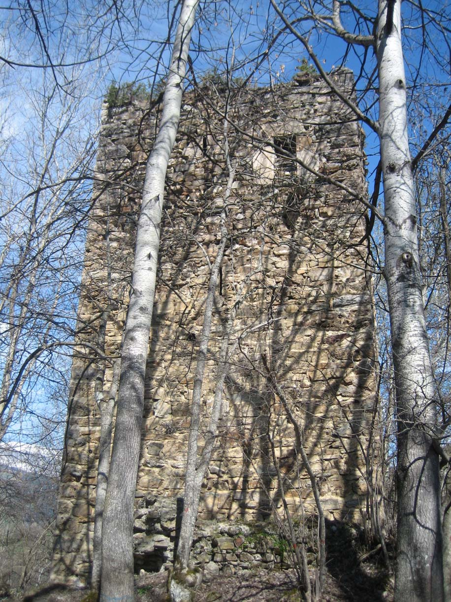 Castelberg Turm